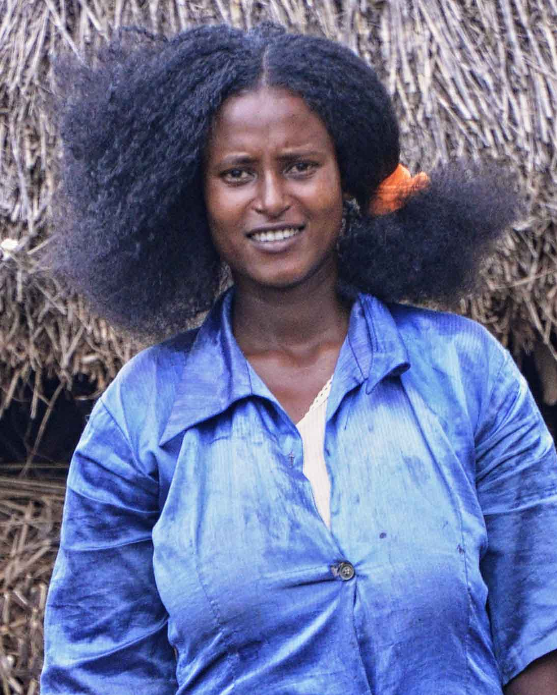 Ethiopia